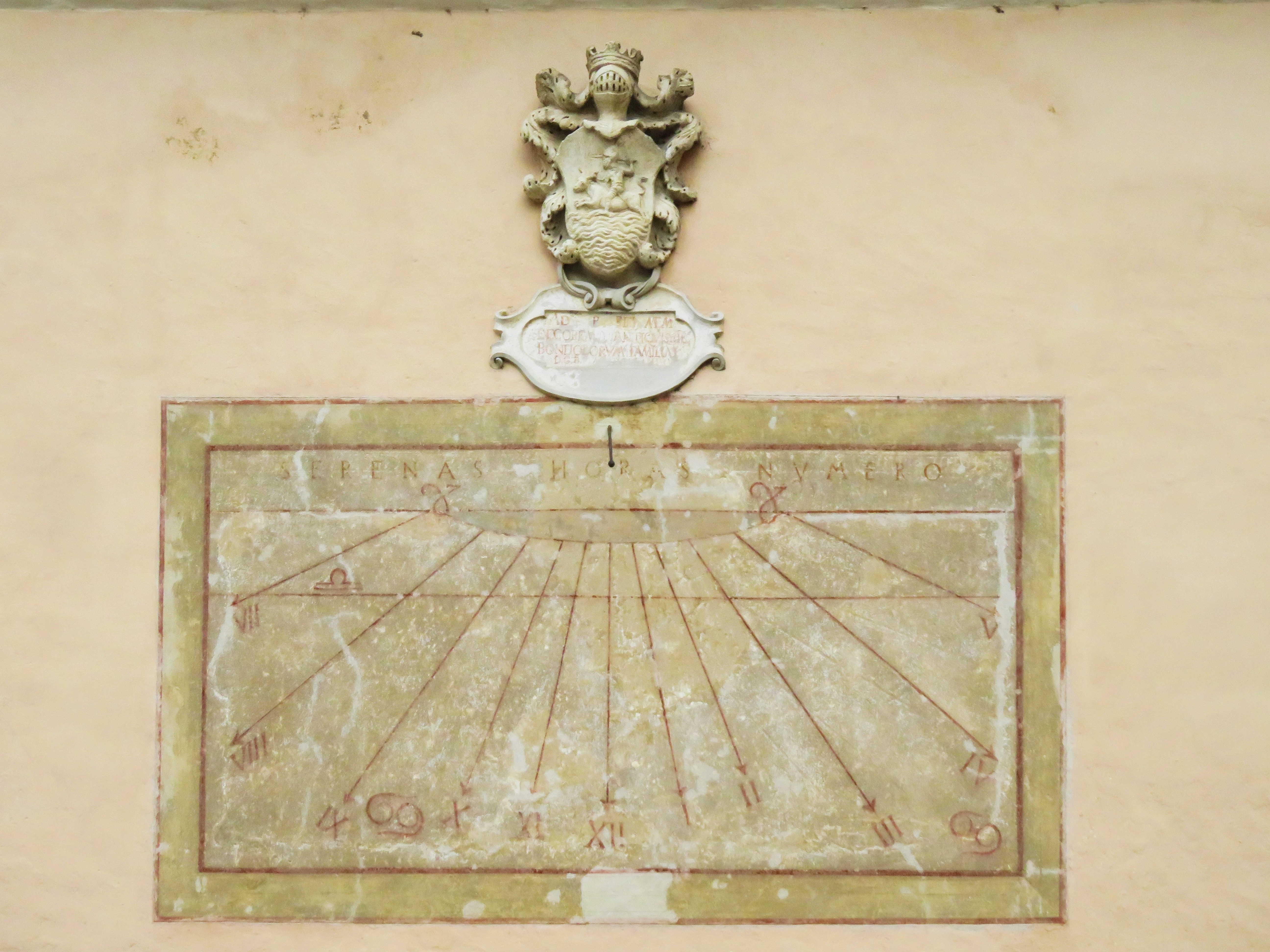 Chiesa di San Giovanni Battista, lato sud su viale Vittoria. Cappella dell'Immacolata con meridiana